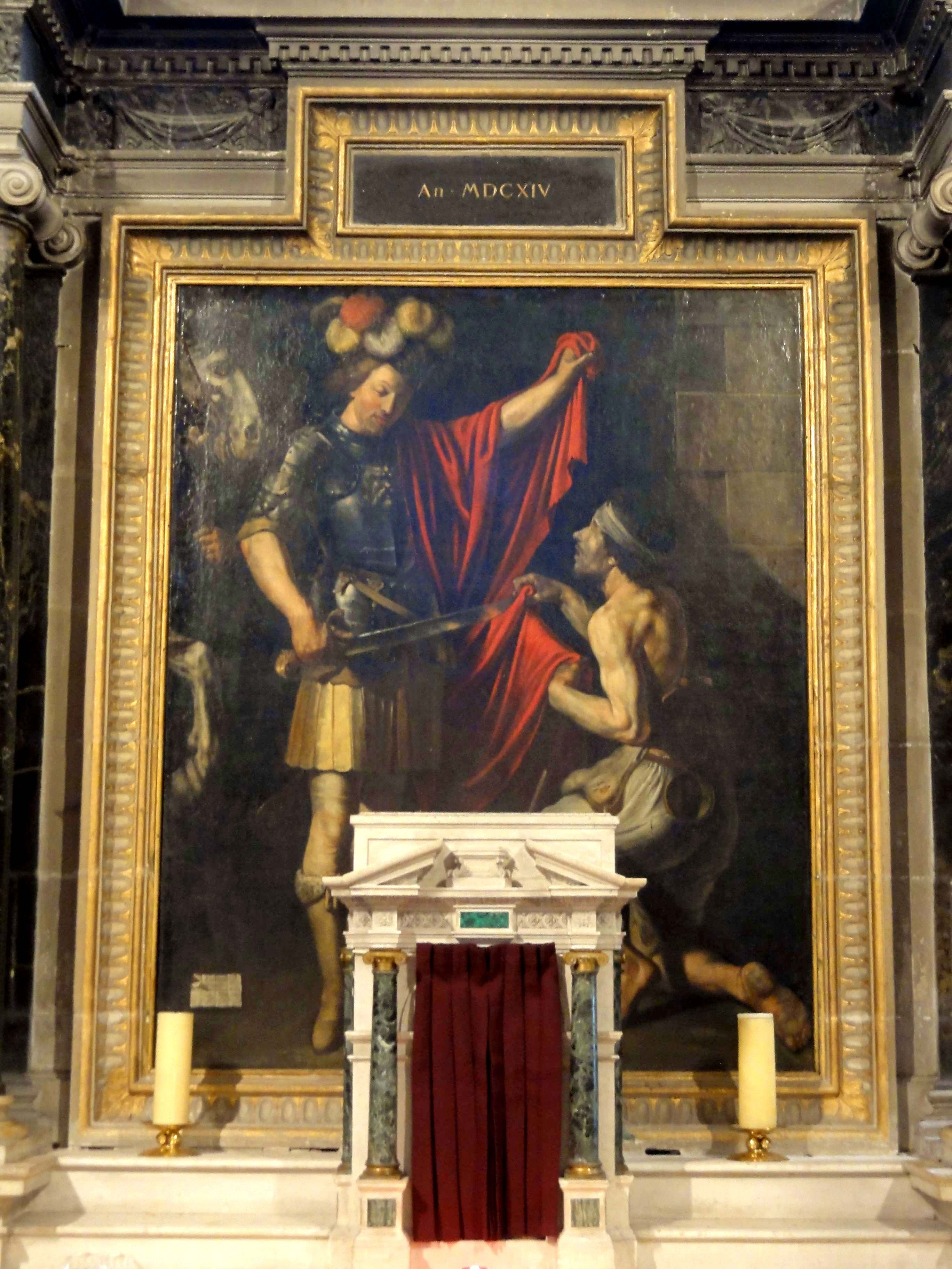 Voir titre.